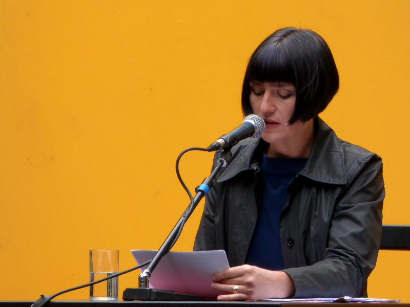 German writer Monika Zeiner (* 1971) at the Erlanger Poetenfest 2013.